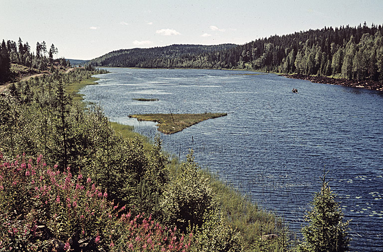 Insjömiljö